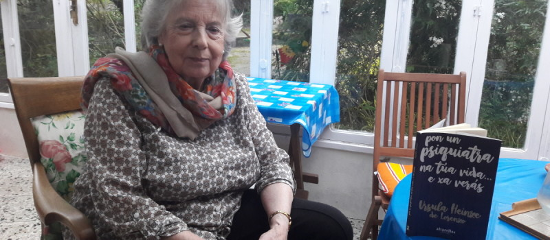 Úrsula Heinze nunha entrevista.